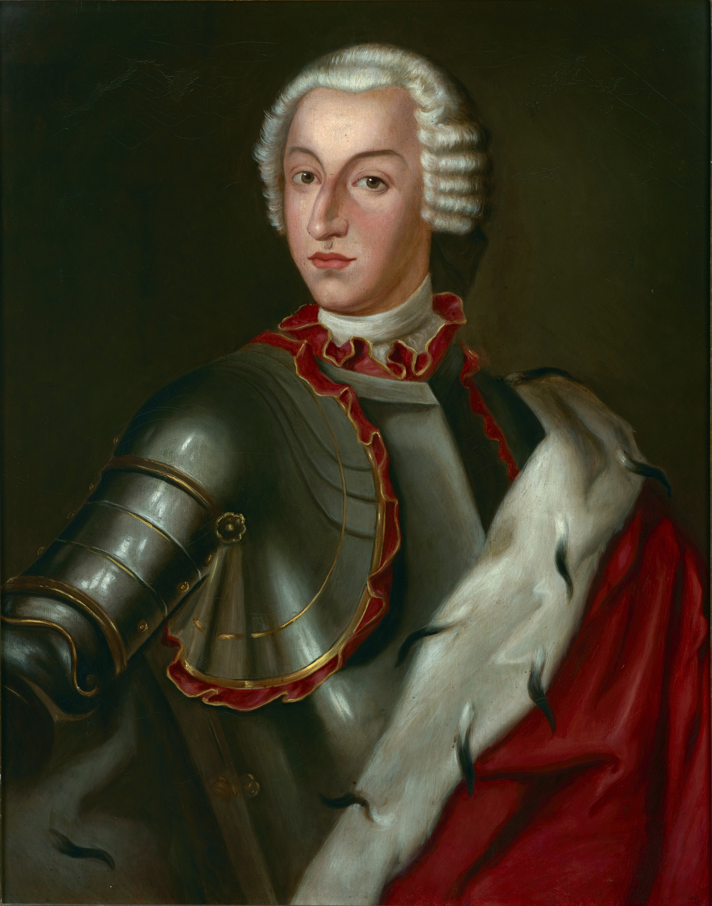 Беларуская (тарашкевіца): Партрэт Лявона Міхала Радзівіла (Lavon Michał Radzivił)